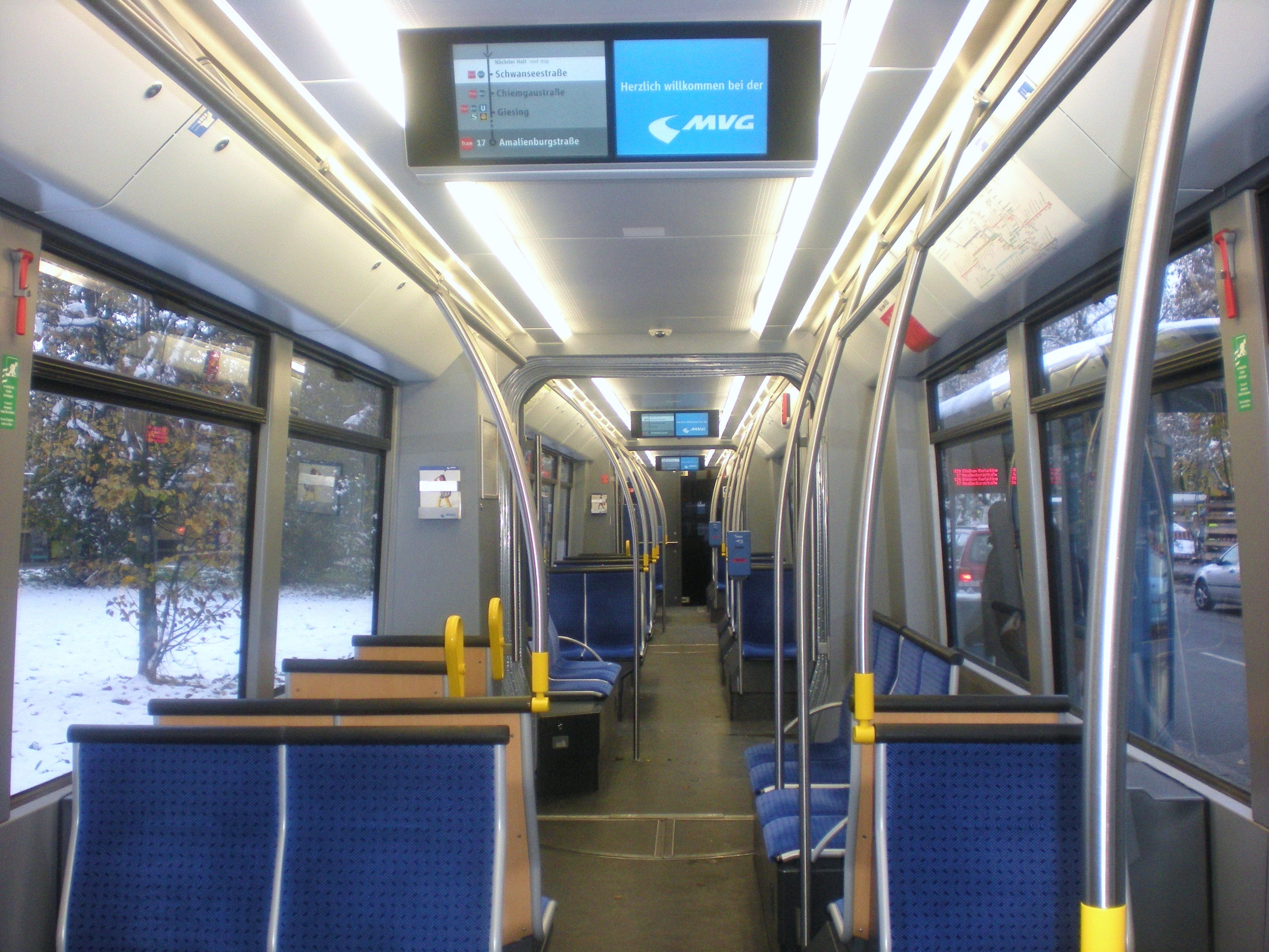 Innenraum eines modernisierten Fahrzeugs der Baureihe R 2.2 der Straßenbahn München (Linie 17, Schwanseestraße)